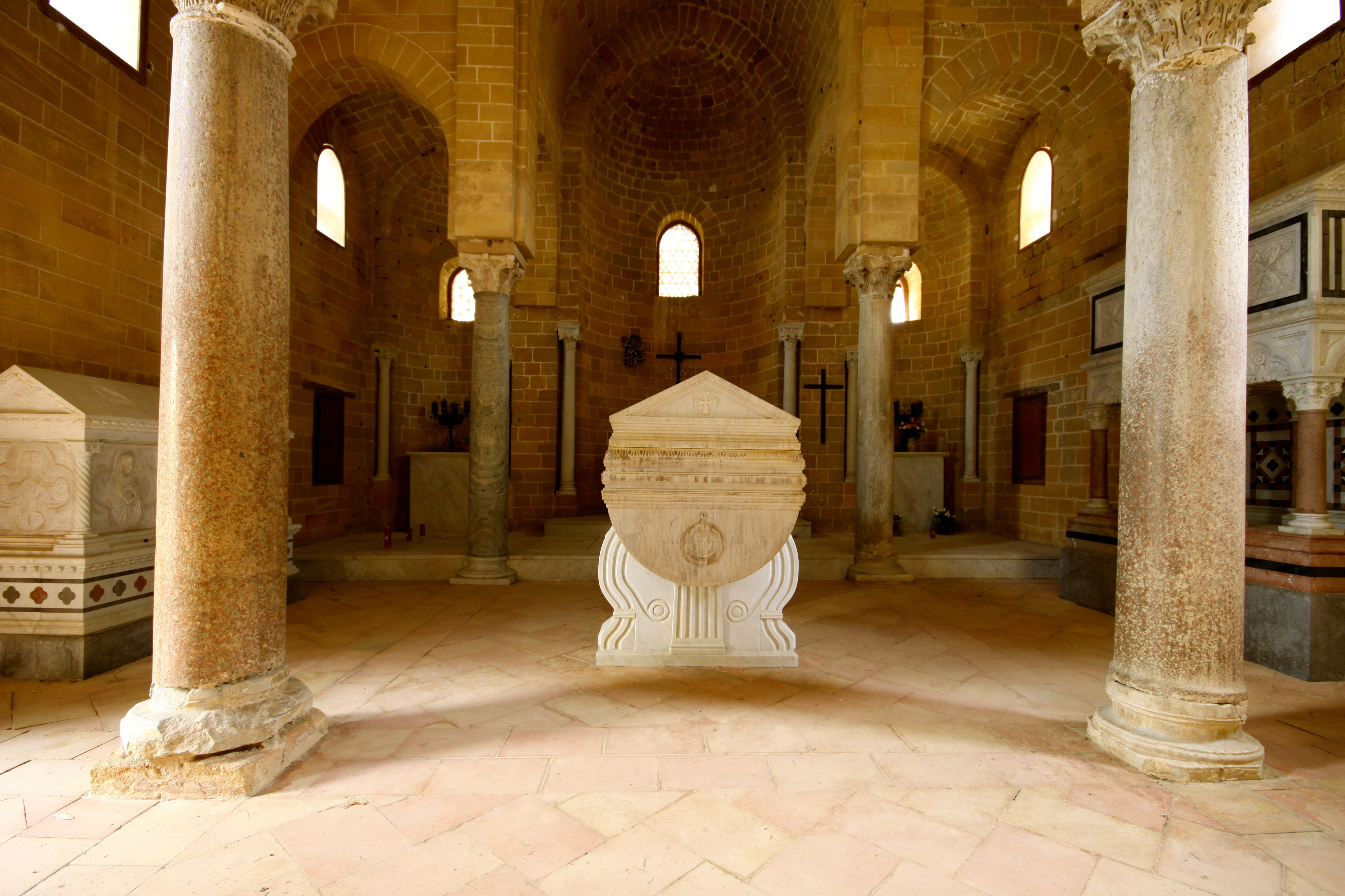 Castelvetrano, Santissima Trinita di Delia, interior